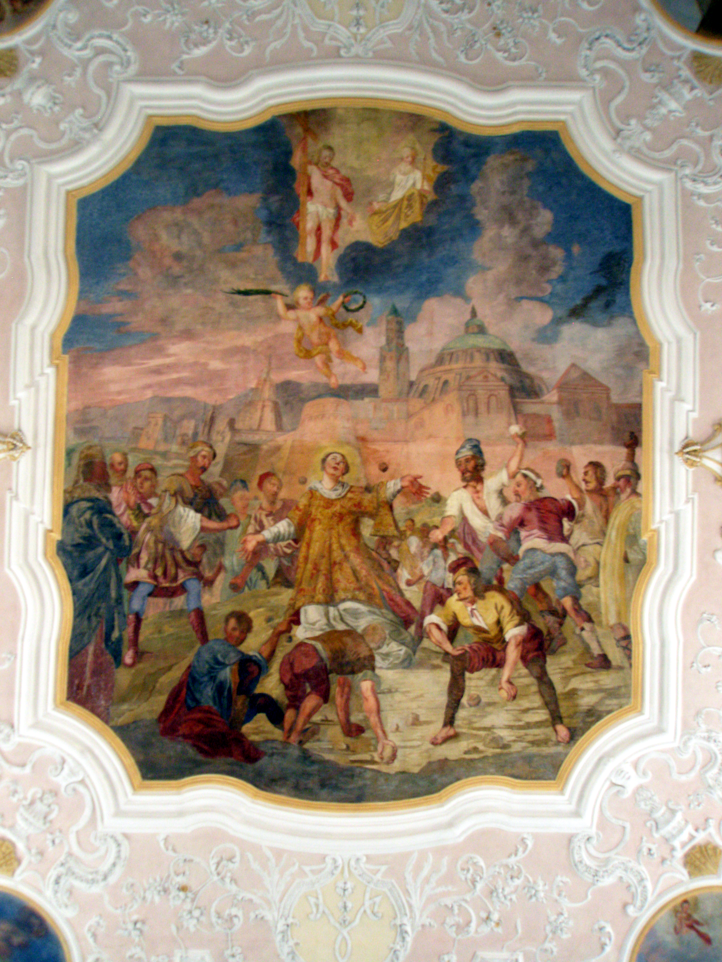 Die Steinigung des Heiligen Stephanus (Deckenfresko im Altarraum der Schwendier Stephanuskirche)